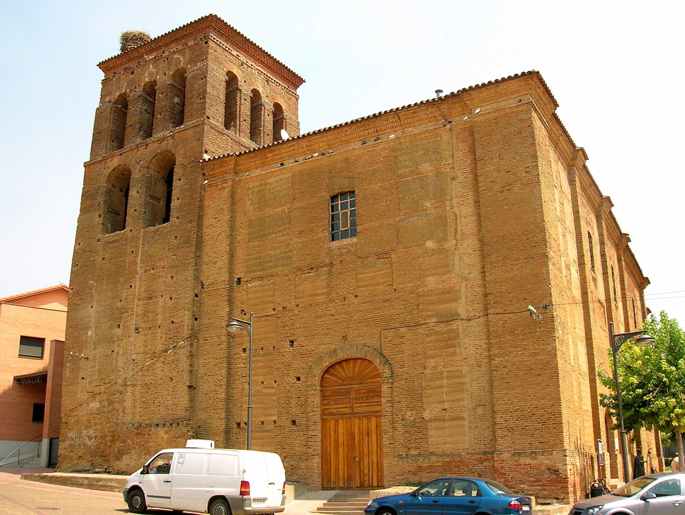 Iglesia de la Trinidad (Albergue de Peregrinos), Sahagún, León, España